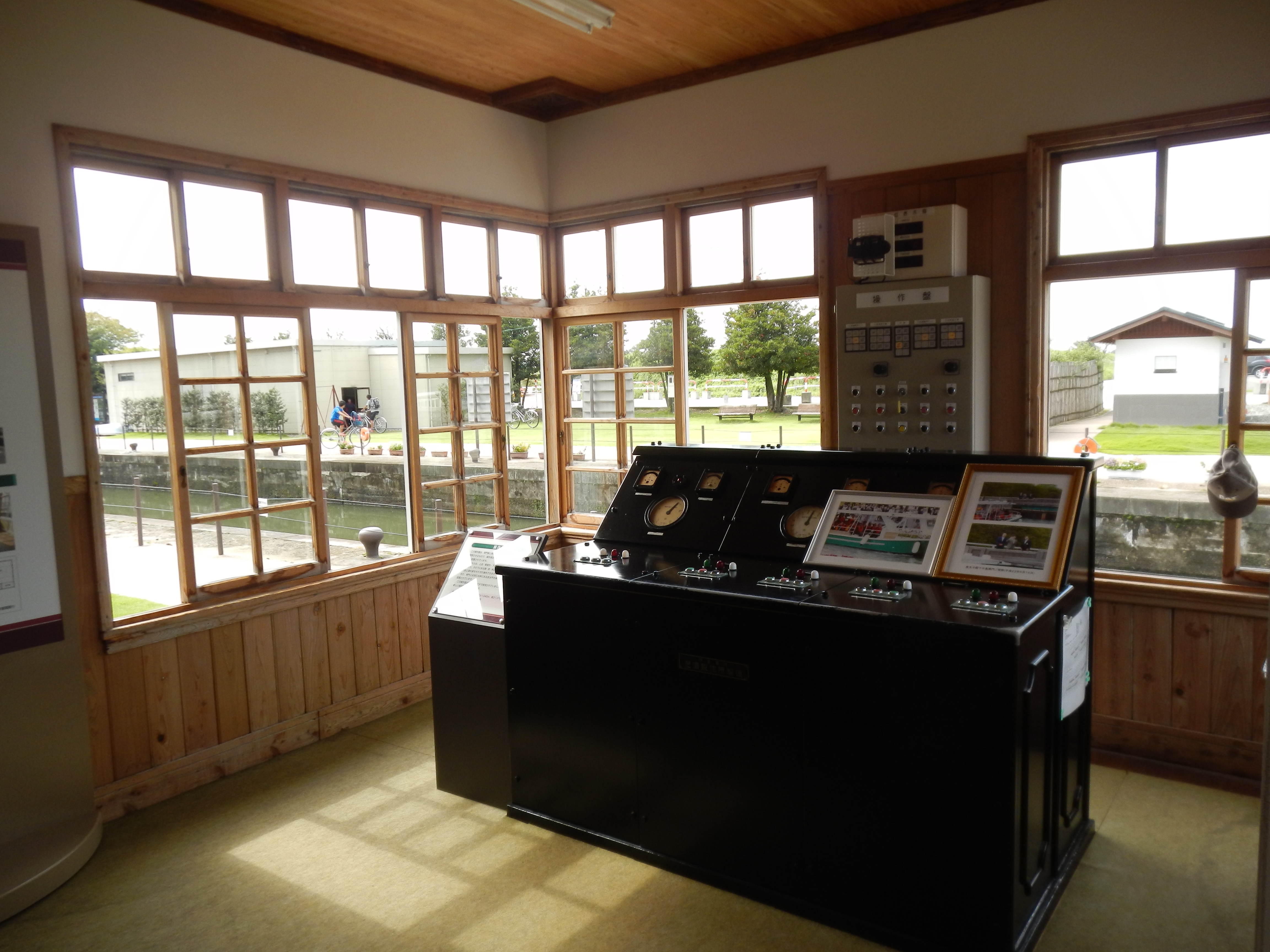 2 Chome Nakajima, Toyama-shi, Toyama-ken 930-0801, Japan